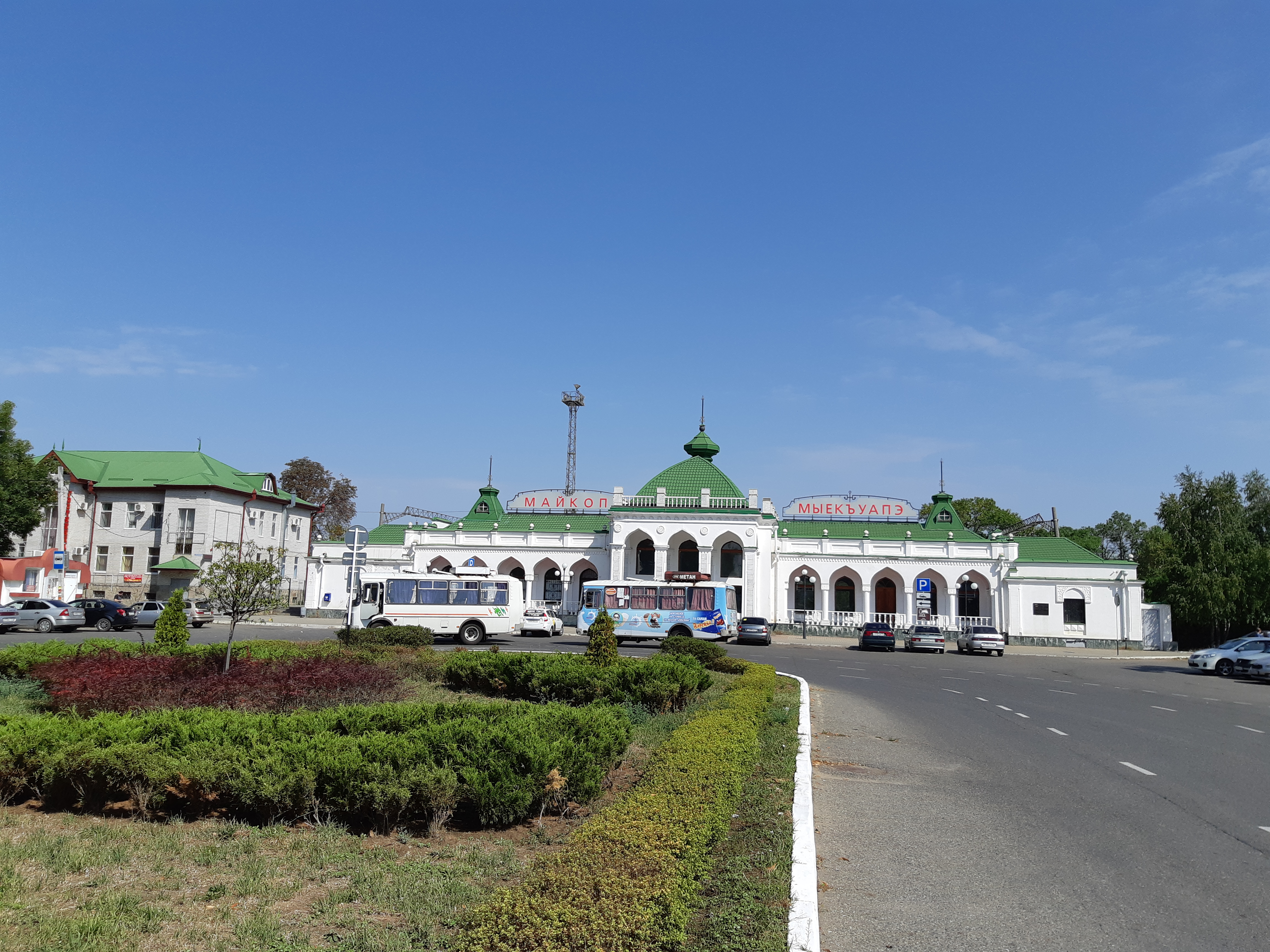 Место, где стоял агитпоезд Октябрьская революция во главе с председателем ВЦИК М.И. Калининым: ж/д ст. Майкоп, Майкоп, Адыгея